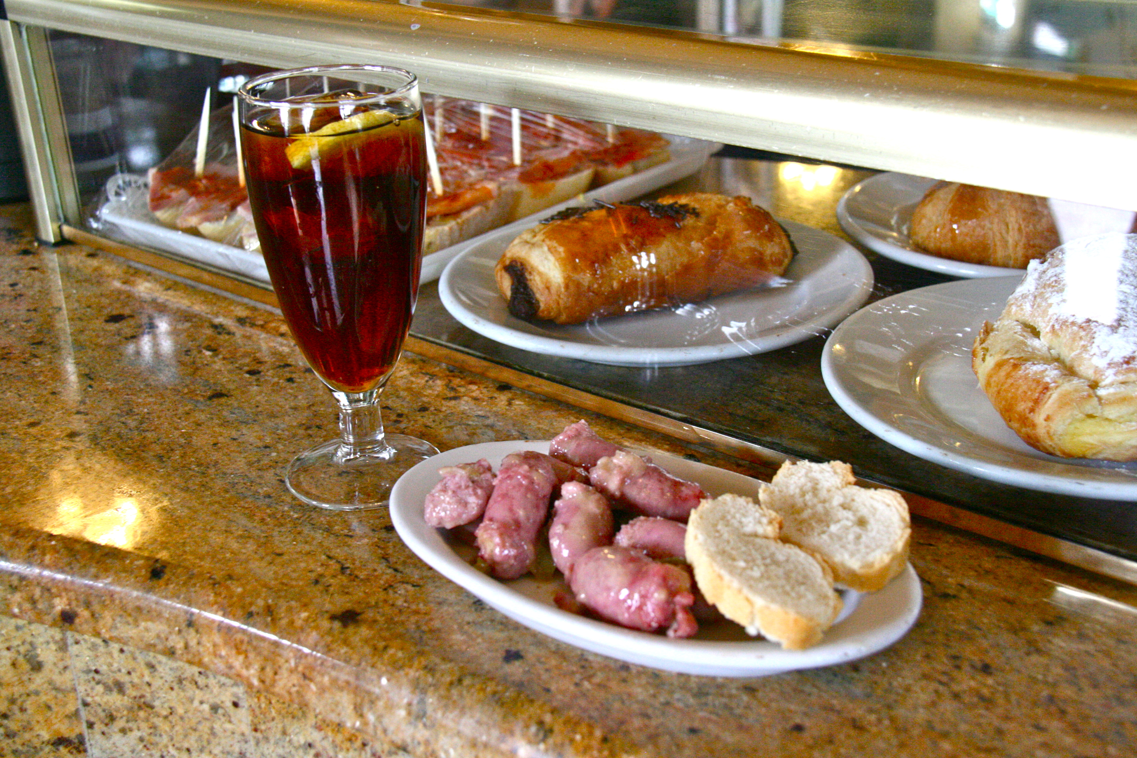 Vermouth con tapa de salchichas de polllo